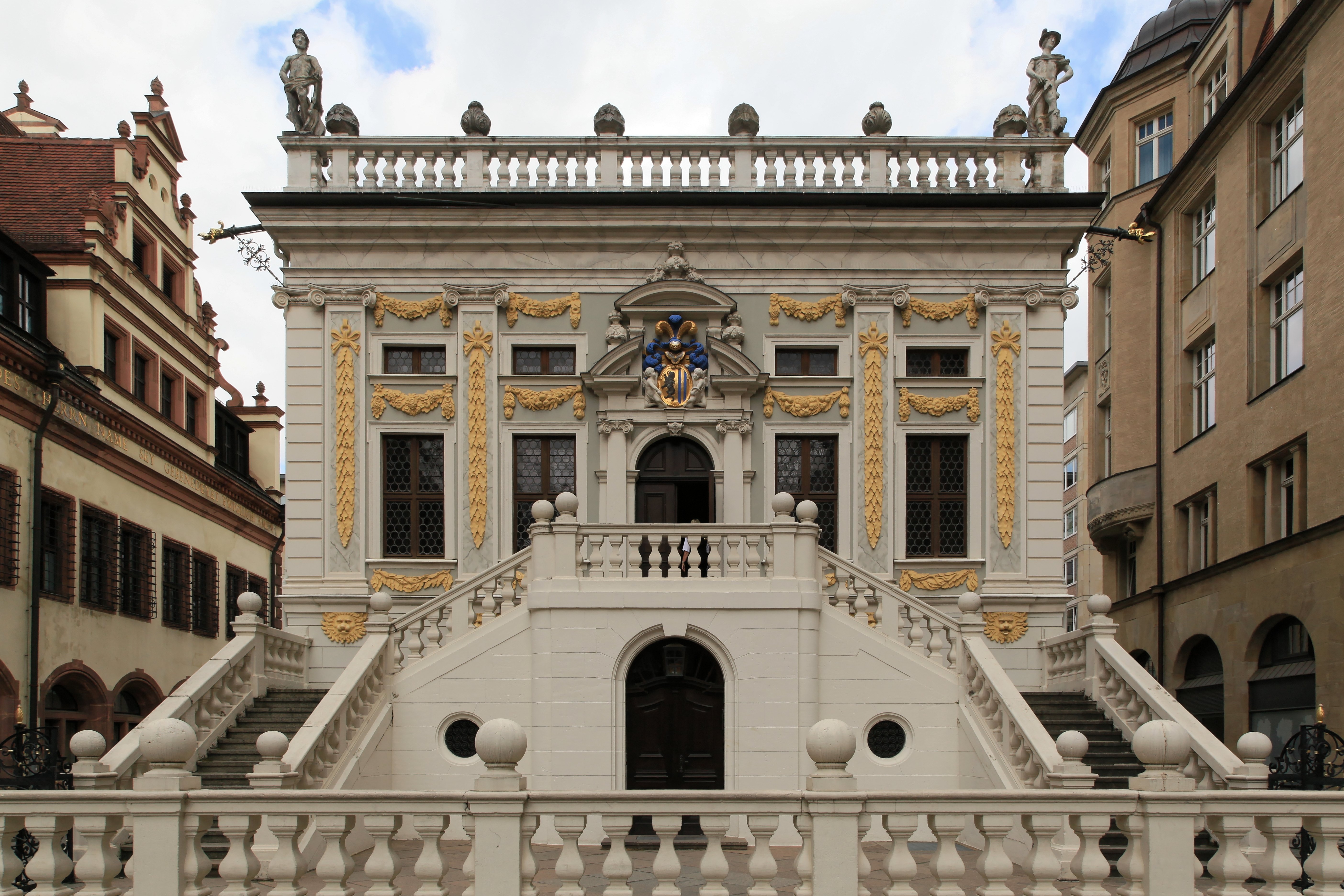 Alte Börse, Naschmarkt in Leipzig